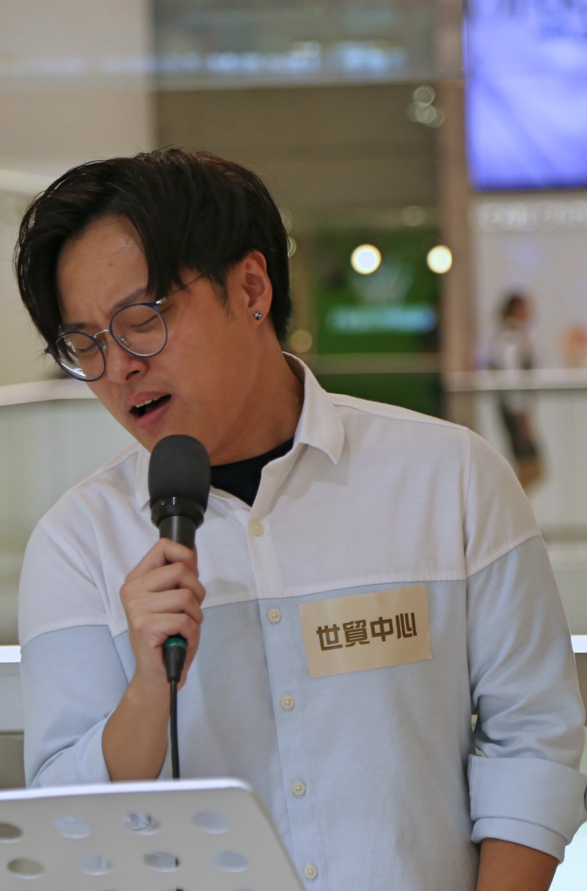 KeithChung於銅鑼灣世貿中心演唱。